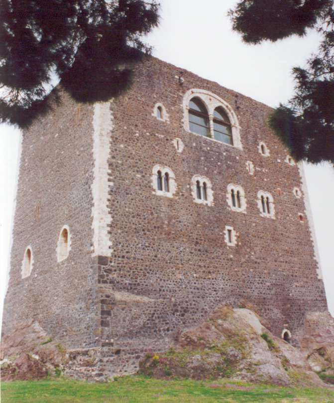 Antonio Caruso Il Castello Normanno di Paternò (CT)